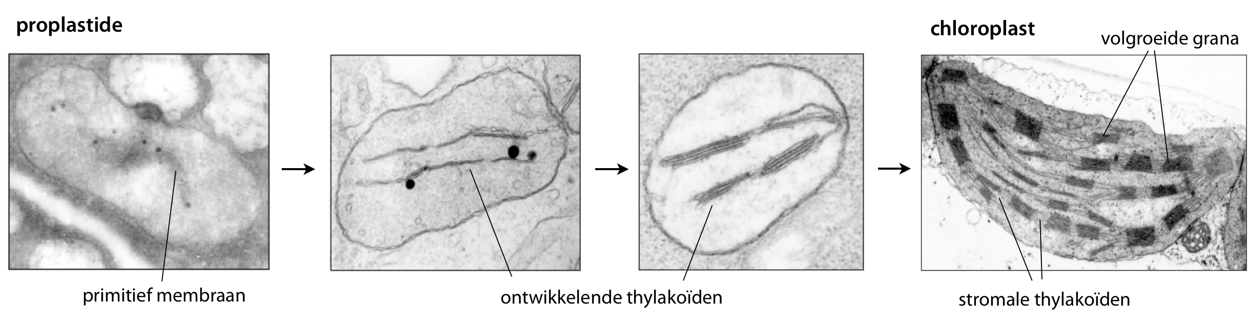 De ontwikkeling van een proplastide tot een volgroeide chloroplast